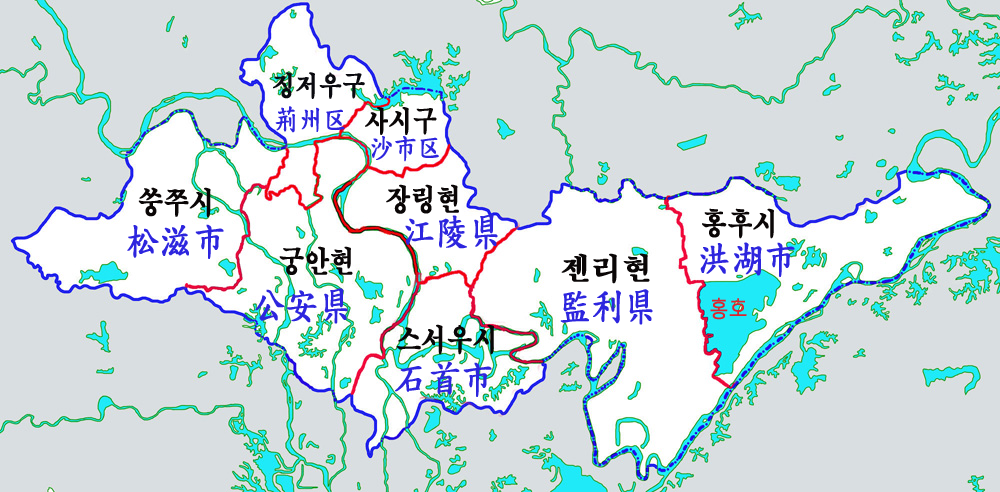 호북성 징저우시 현급행정구역